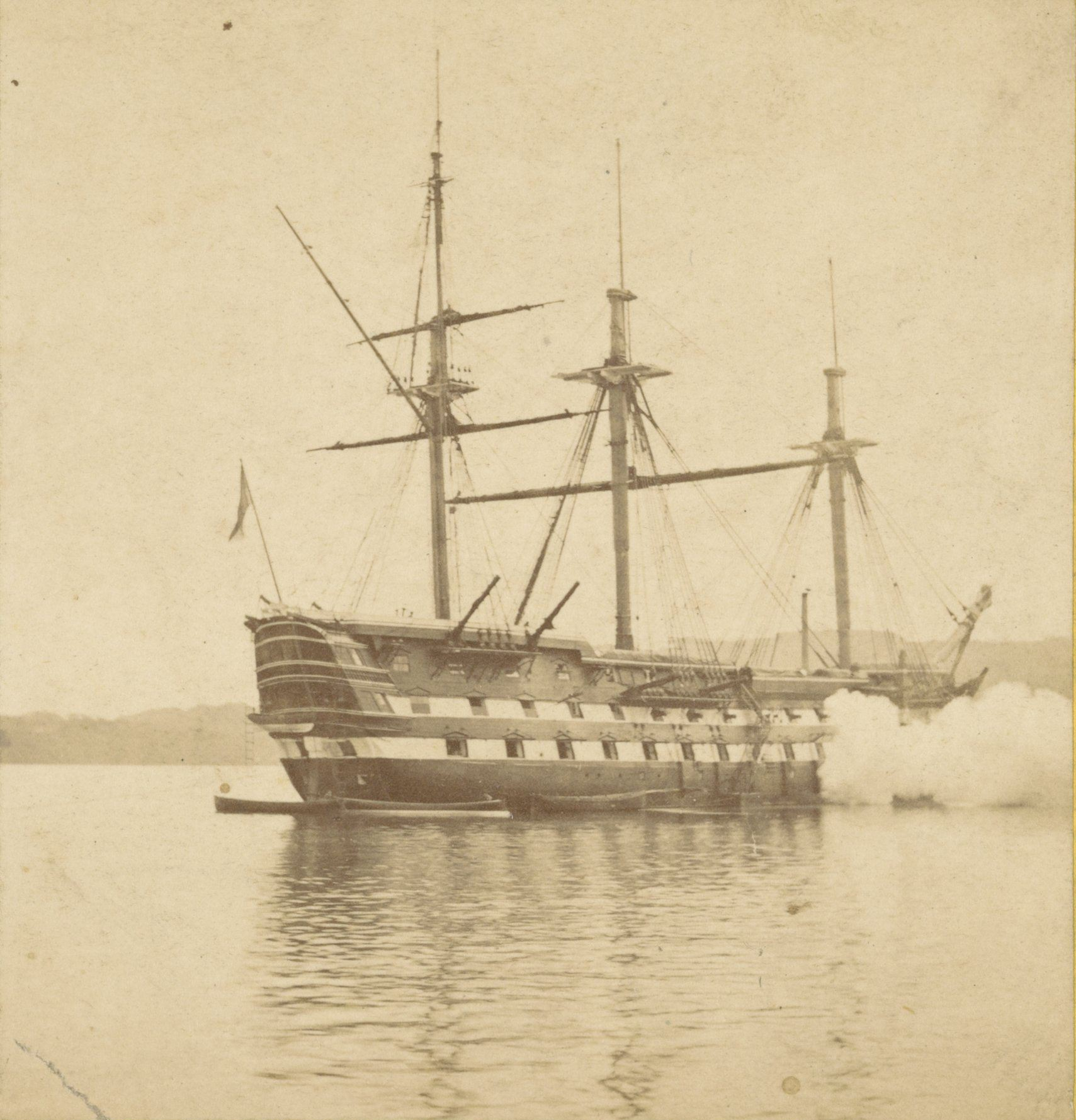 IdentificatieTitel(s): Driemaster HMS Cambridge vuurt een oefenschot af op de HamoazeH.M.S. "Cambridge," in Hamoaze, Great-Gun Practice (titel op object)Objecttype: stereofoto Objectnummer: RP-F-F04824Opschriften / Merken: nummer, verso, gedrukt: ‘No. 316.’naam, verso, gedrukt: ‘G. W. Wilson, Photographer, Aberdeen.’nummer, verso, handgeschreven: ‘No. 50’naam, verso, gestempeld: ‘Nolet & Zoon Utrecht’VervaardigingVervaardiger: fotograaf: George Washington Wilson (vermeld op object)Plaats vervaardiging: HamoazeDatering: in of na 1869 - ca. 1880Fysieke kenmerken: albuminedrukMateriaal: karton fotopapier Techniek: albuminedrukAfmetingen: secundaire drager: h 85 mm × b 170 mmOnderwerpWat: firearms: cannonships (in general)Waar: HamoazeVerwerving en rechtenVerwerving: overdracht van beheer 1994Copyright: Publiek domein